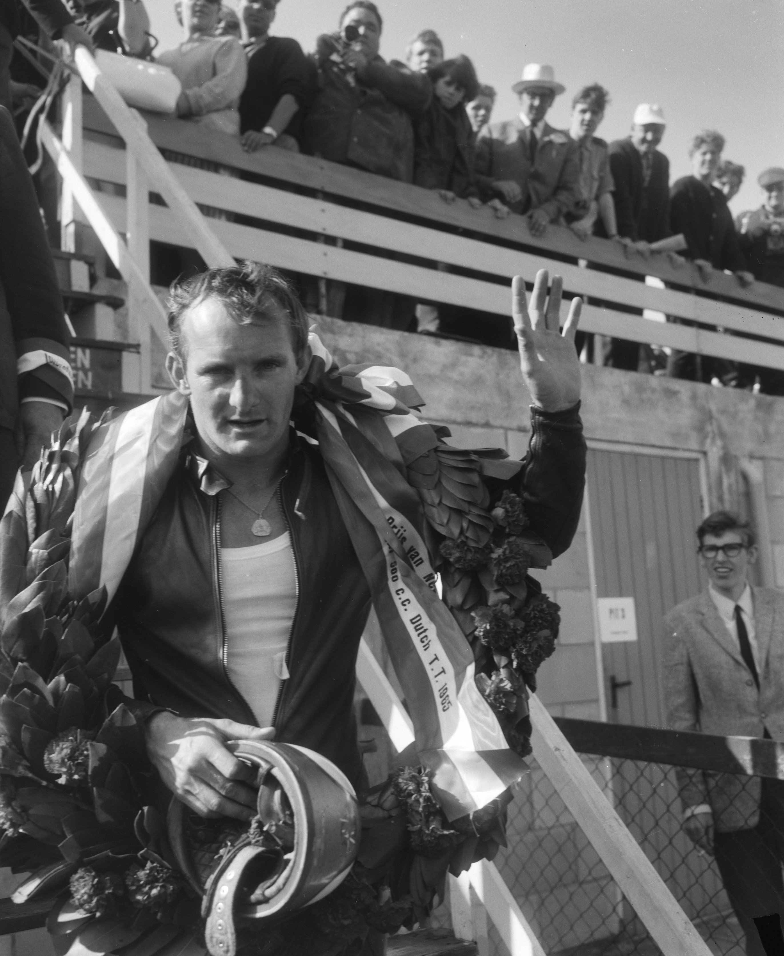 Collectie / Archief : Fotocollectie Anefo Reportage / Serie : TT Assen 1965 Beschrijving : Huldiging. Mike Hailwood winnaar van de 500cc klasse met krans Datum : 26 juni 1965 Locatie : Assen Trefwoorden : motorsport Persoonsnaam : Hailwood, Mike Fotograaf : Bilsen, Joop van / Anefo Auteursrechthebbende : Nationaal Archief Materiaalsoort : Negatief (zwart/wit) Nummer archiefinventaris : bekijk toegang 2.24.01.04 Bestanddeelnummer : 917-9046